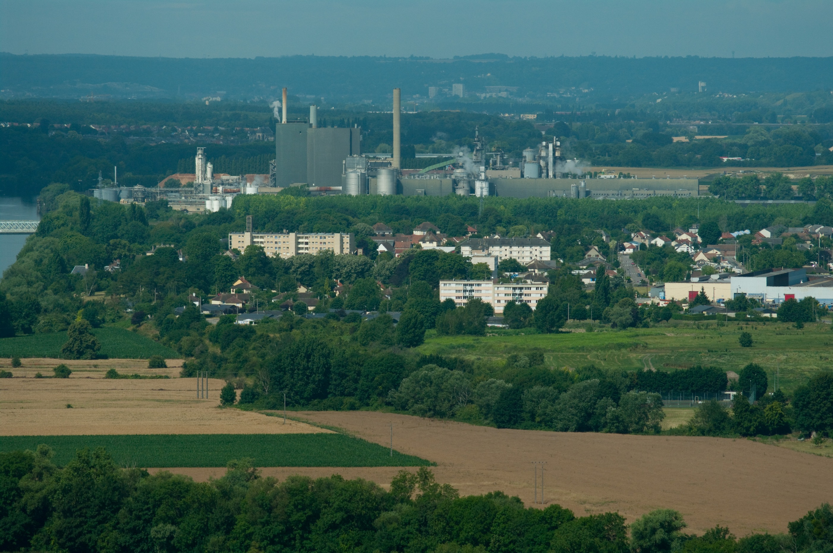 Photographie du Quartier Saint-Martin depuis la colline des Deux-Amants